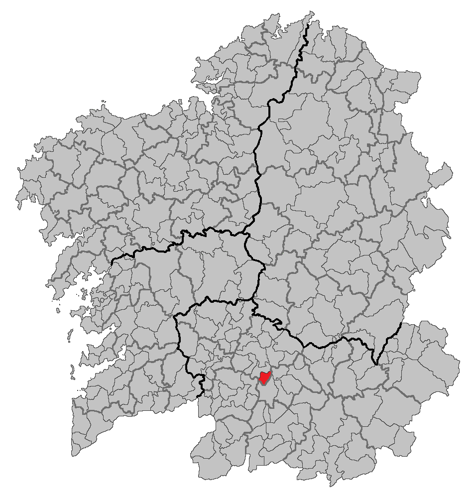 Mapa coa localización do concello de Taboadela.